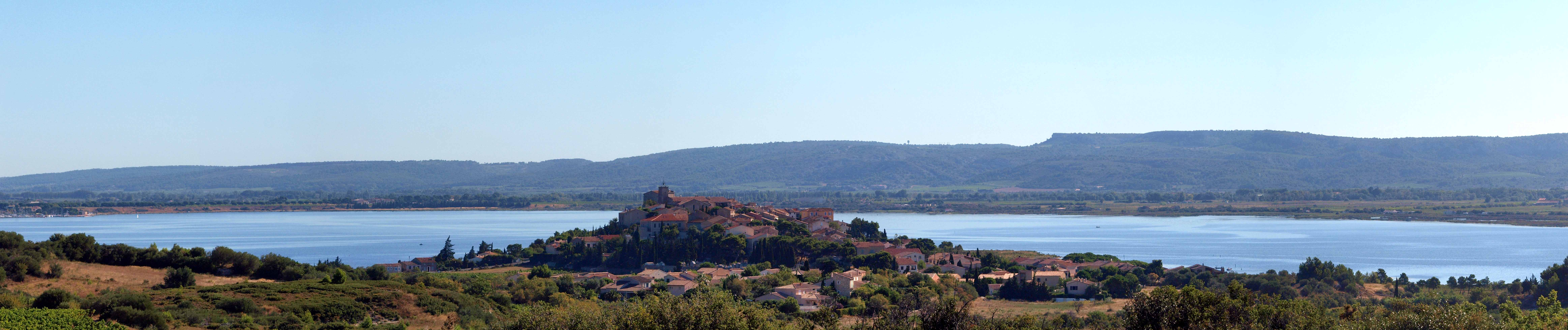 Panorama de Bages (Aude)